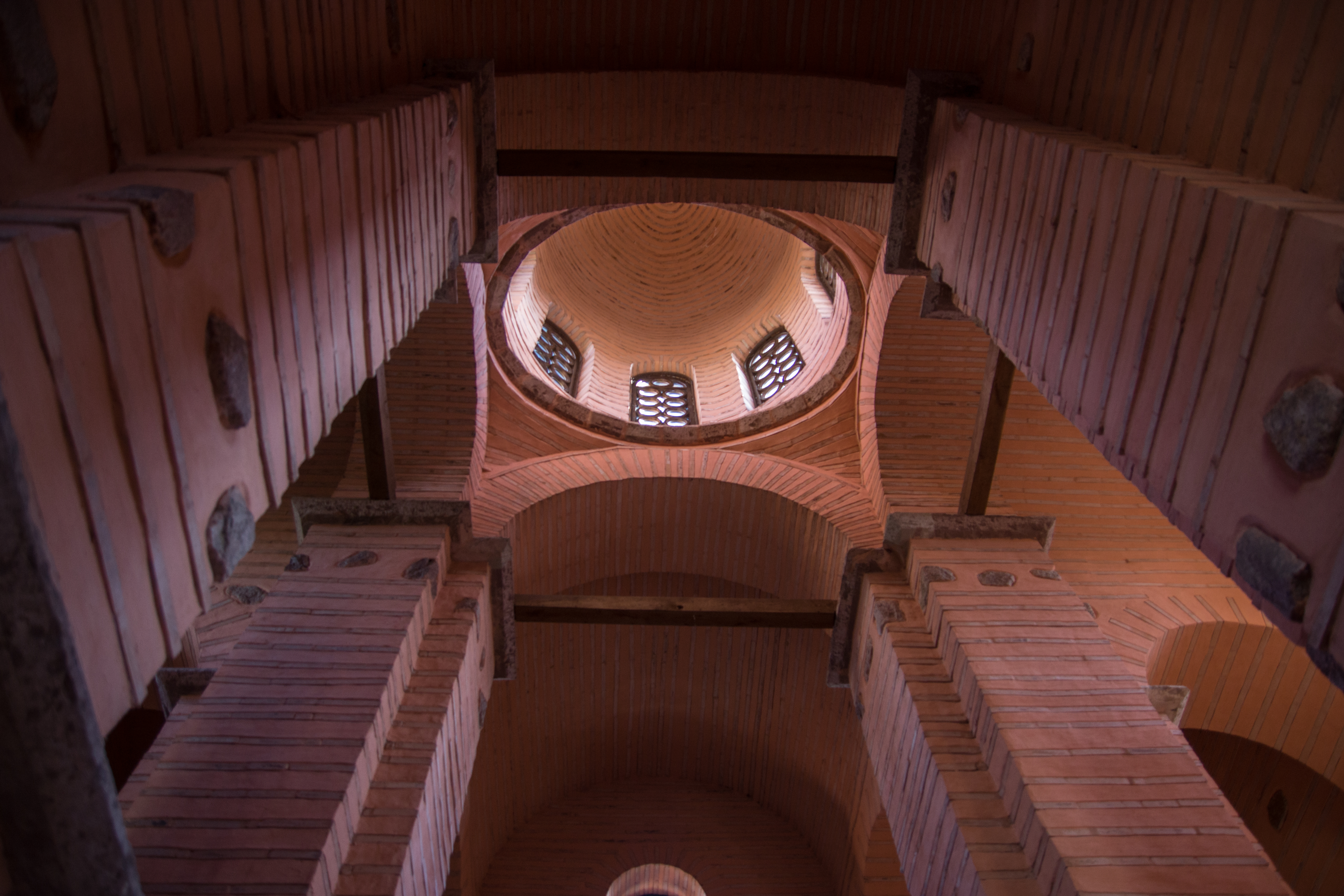 Puerta Dorada Techo